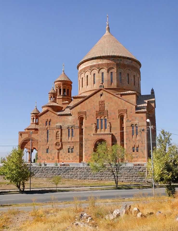 Աբովյան քաղաքի Սուրբ Հովհաննես եկեղեցին